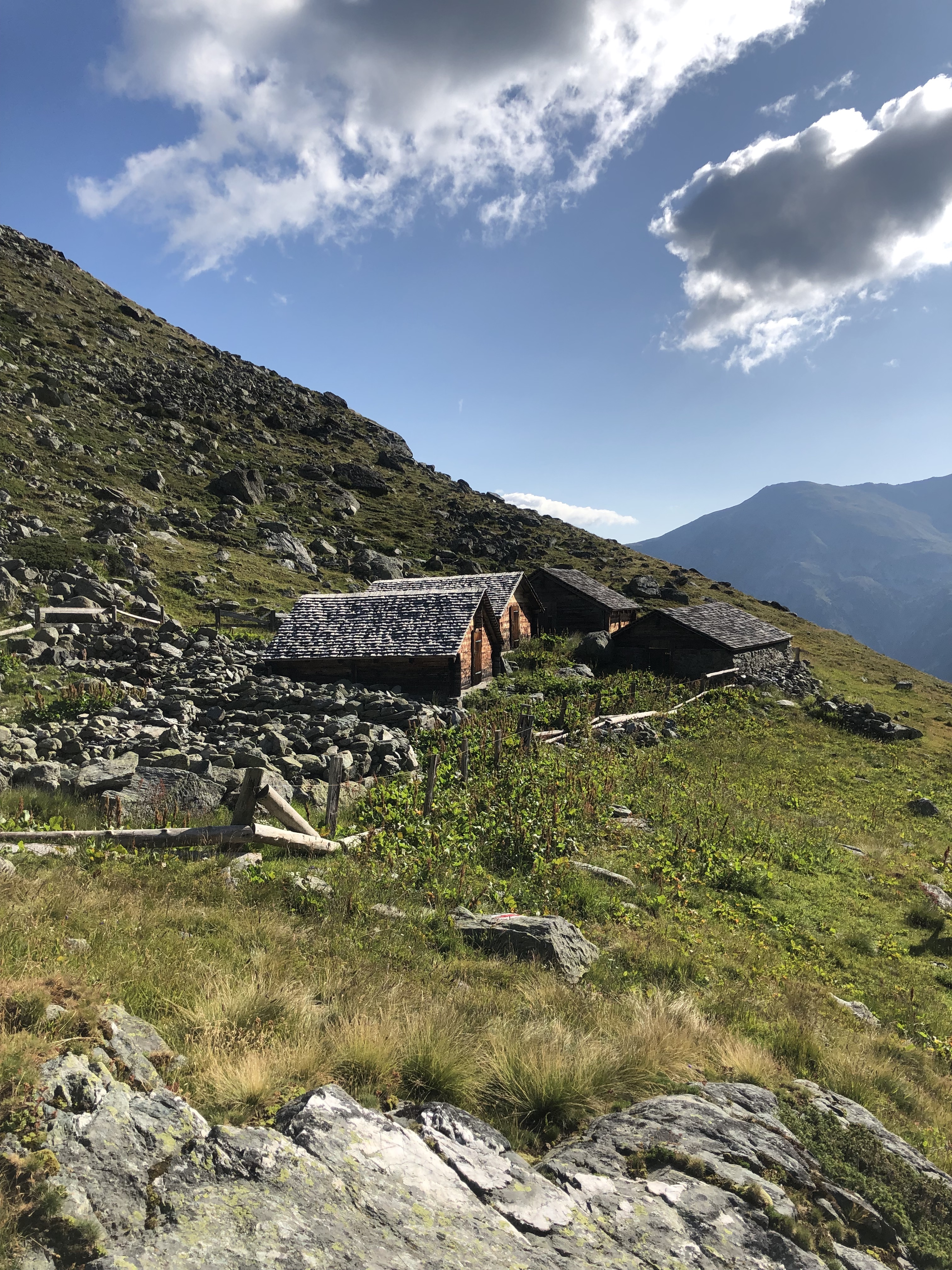 Zu sehen sind die Alpgebäude des obersten Stafels Ängi der Borteralpe (erbaut 1931, saniert 1999-2001)